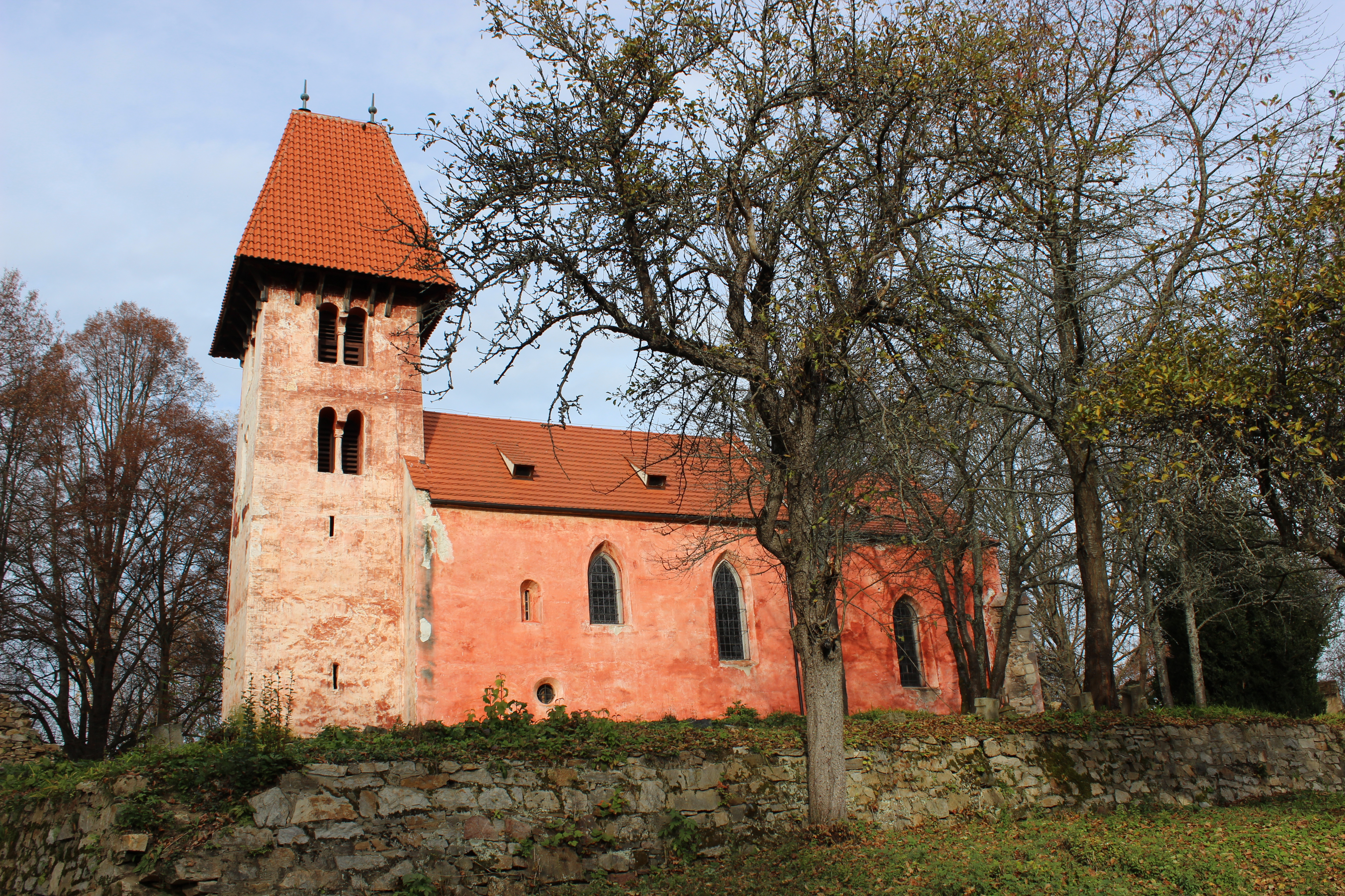 Kostel svatého Mikuláše. Boletice ve vojenském újezdu Boletice. Okres Český Krumlov. Česká republika.